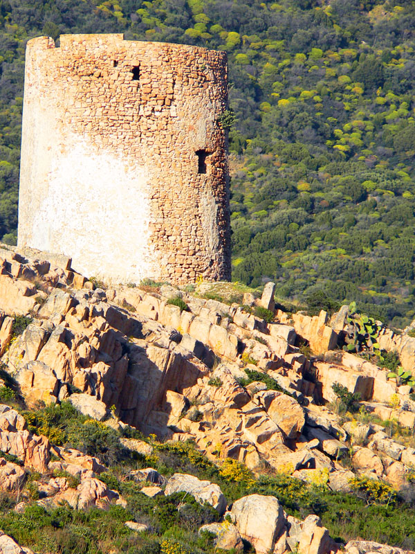 Porto Teulada. Torre costiera di Budel